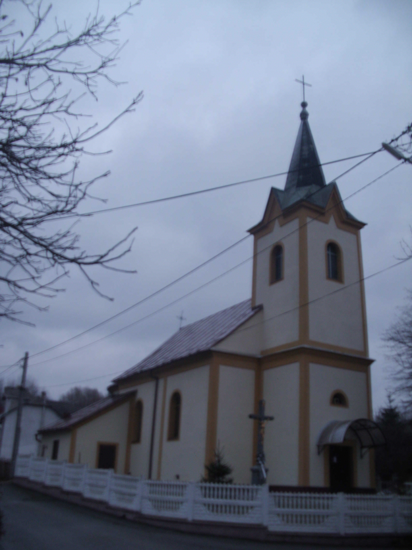 Rímsko katolícky kostol v Tisinci